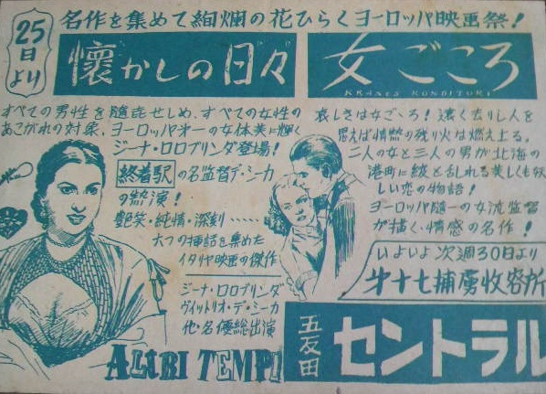 東京セントラル劇場(通称五反田セントラル)チラシ広告、1954年